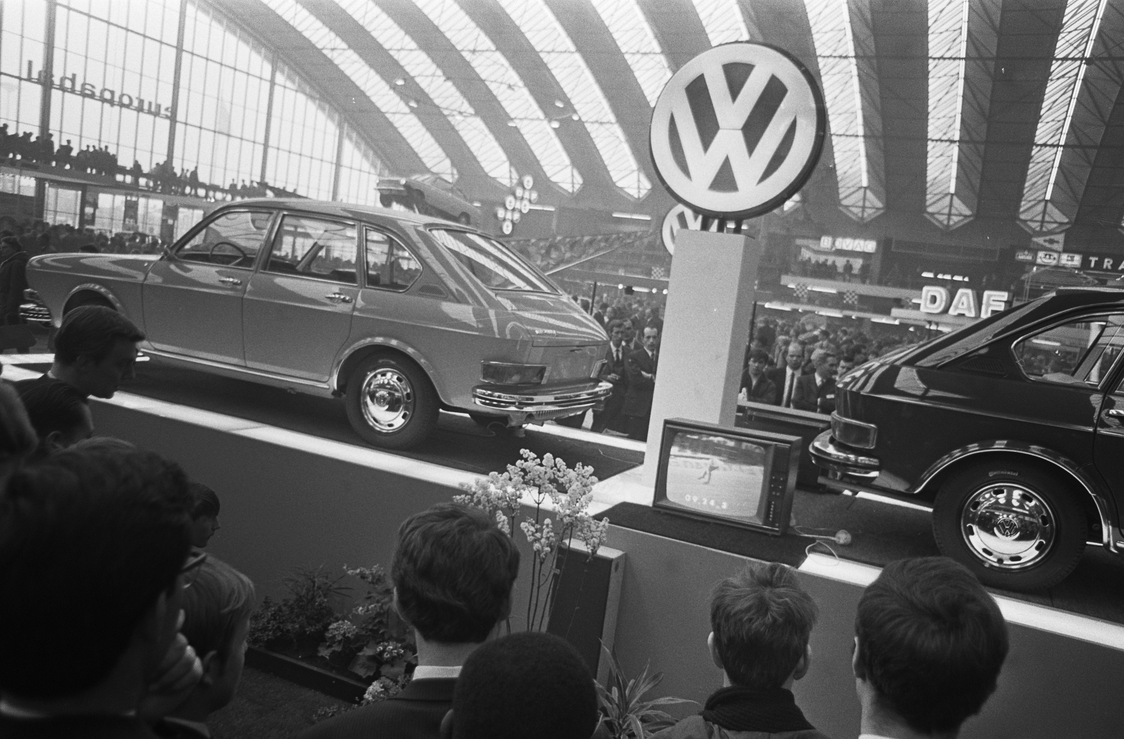 Collectie / Archief : Fotocollectie Anefo Reportage / Serie : [ onbekend ] Beschrijving : Drukte op de auto-tentoonstelling in de RAI kijken naar schaatswedstrijden op TV Datum : 16 februari 1969 Locatie : Amsterdam, Noord-Holland Trefwoorden : auto's Instellingsnaam : RAI Fotograaf : Nijs, Jac. de / Anefo Auteursrechthebbende : Nationaal Archief Materiaalsoort : Negatief (zwart/wit) Nummer archiefinventaris : bekijk toegang 2.24.01.05 Bestanddeelnummer : 922-1077